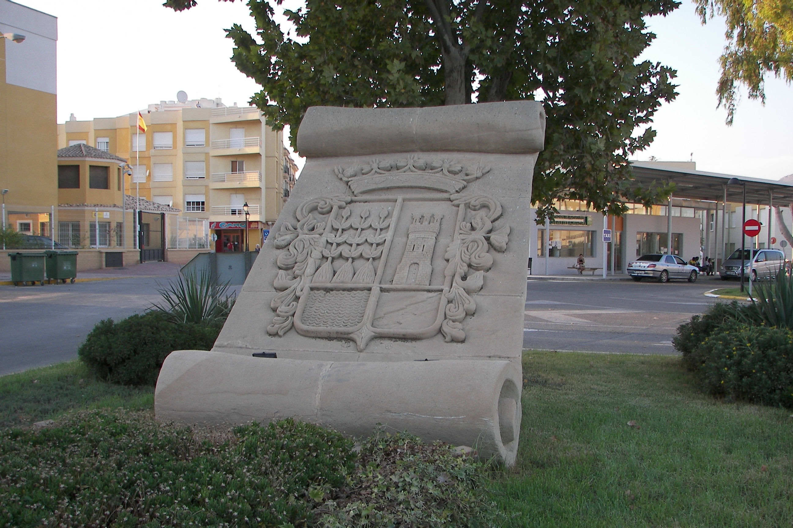 El escudo de Cuevas del Almanzora saluda a los viajeros que llegan a la localidad.